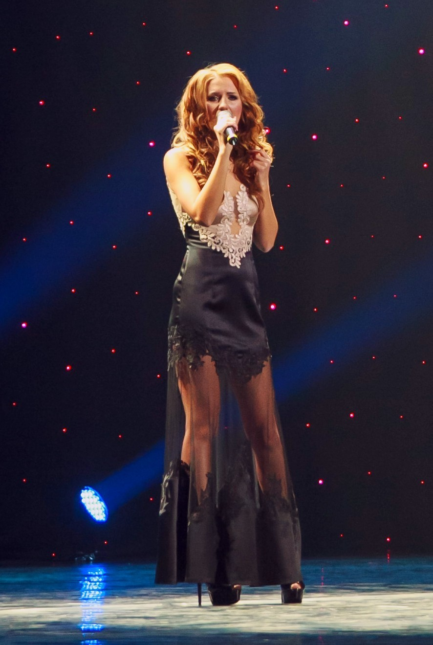 Ольга Василюк. Сольный концерт в Дворце "Украина"